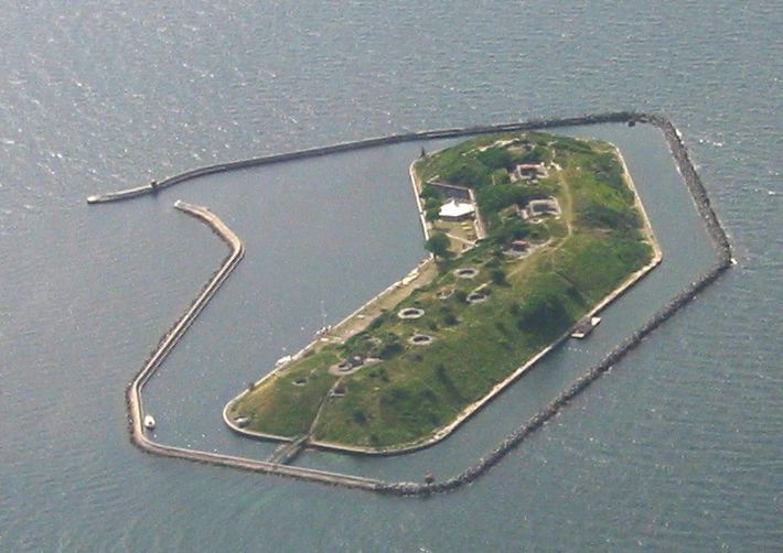 Flakfortet sea fortress outside Copenhagen.